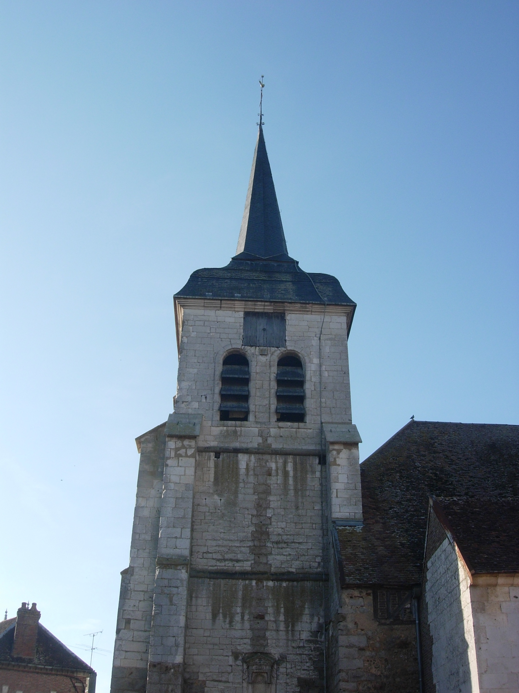 Eglise de Rigny-le-Ferron